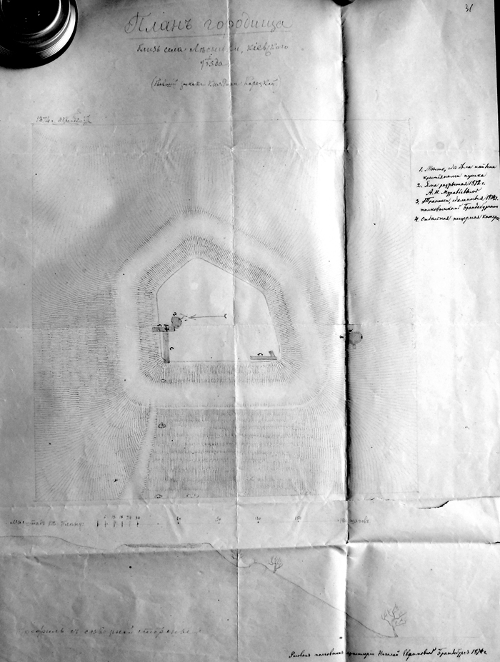 План решток замку князів Корецьких в селі Лісники Києво-Святошинського району. Складений Миколою Бранденбургом, 1847 рік. Підписи: План городища близ села Лесники, Киевского уезда (бывший замок княгини Корецкой). 1874 г. ... 1. Место, где была найдена ... пушка 2. Яма, разрытая 1872 [?] г. А. Н. Муравьёвым 3. Траншея, сделанная 1874 [?] полковником Бранденбунгом 4. ... ... ... Масштаб к плану: ... шагов Профиль от северной стороны Рисовал полковник артиллерии Николай Ефимович Бранденбург 1874 г.